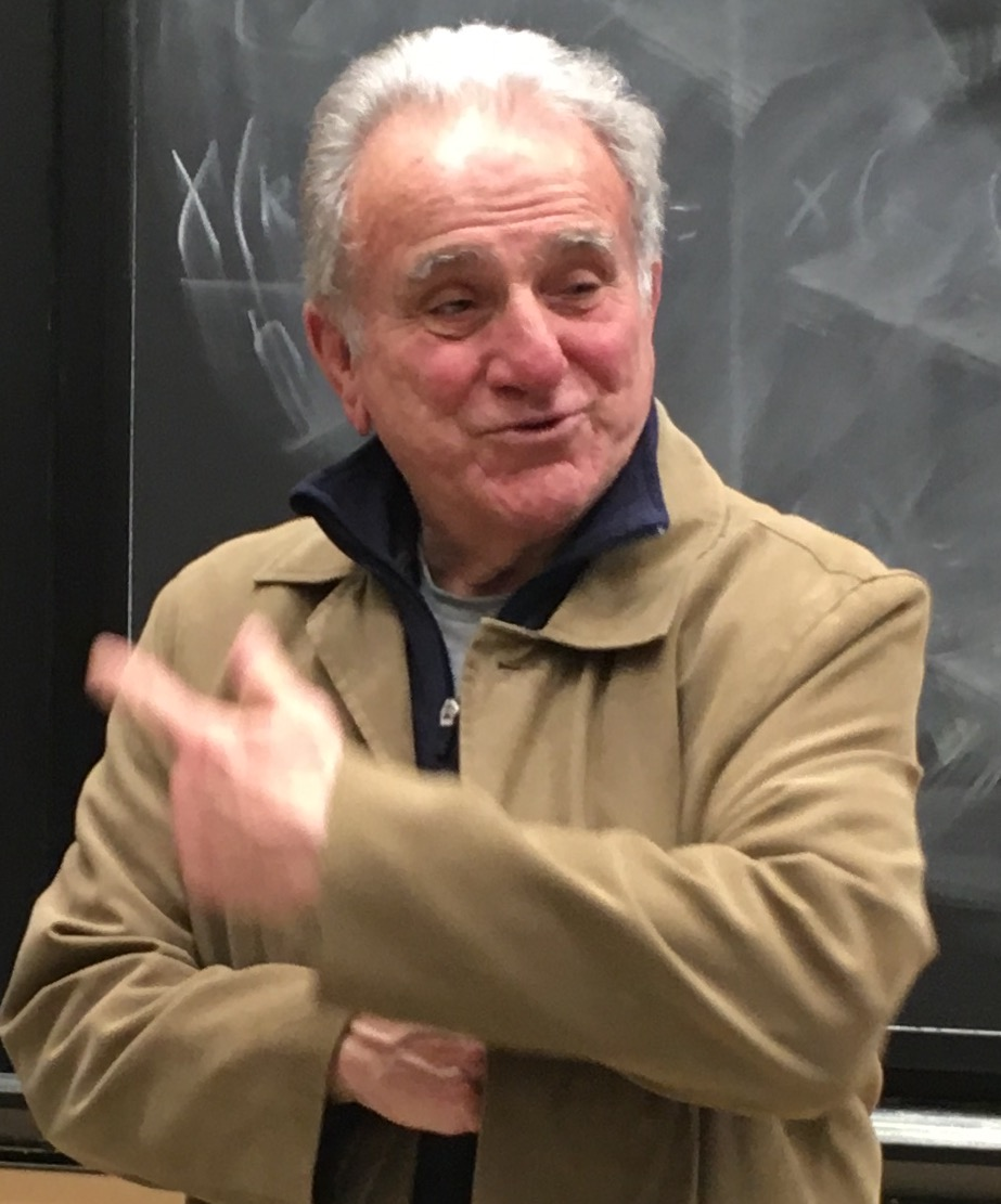 Stephen A. Kurkjian